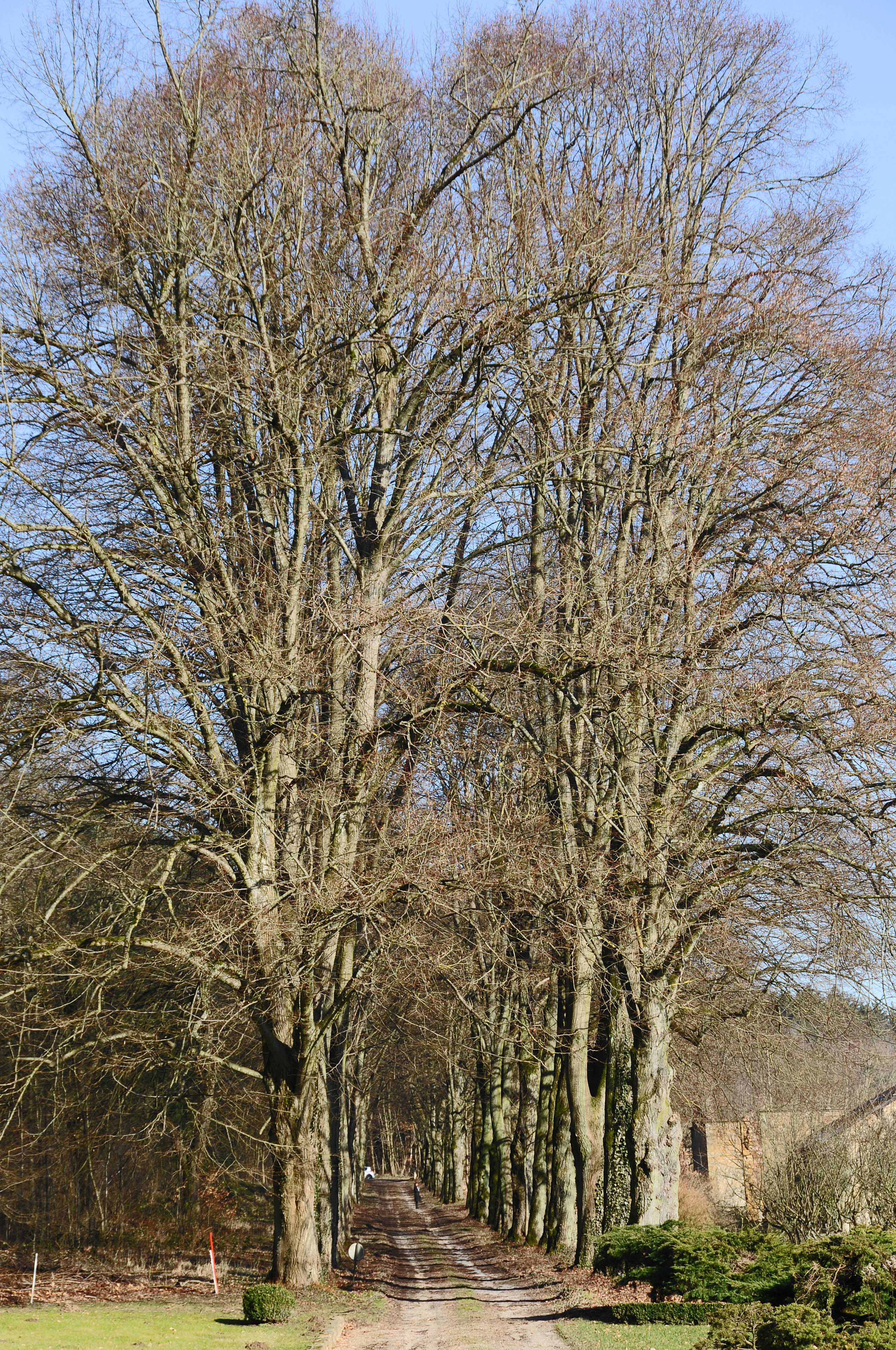 Lannenallee um Scheedhaff.